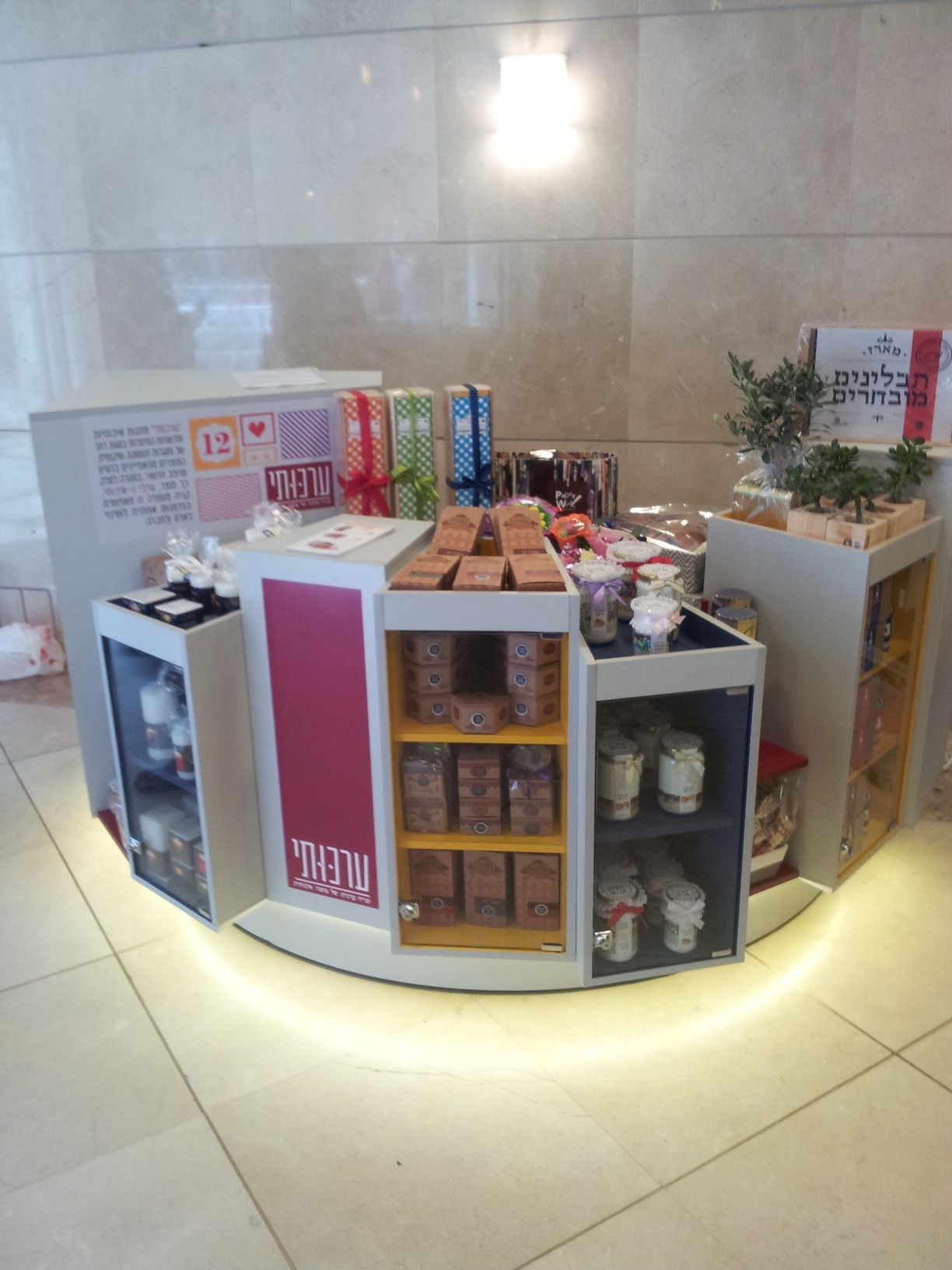 תחום ערכותי בקבוצת שכולו טוב